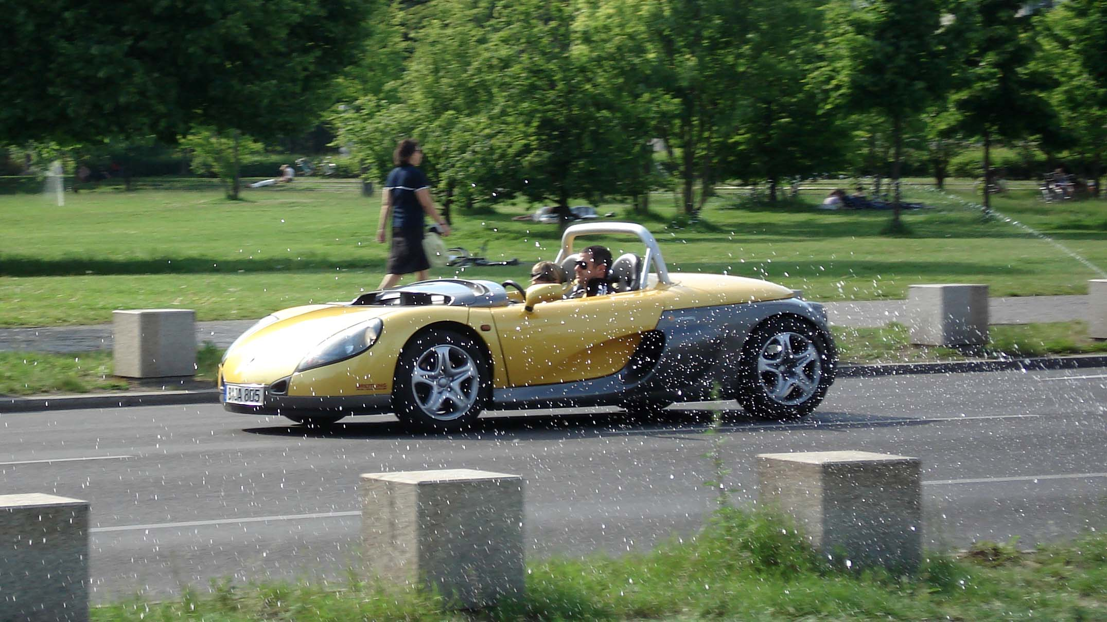 Renault Spider 1st Series